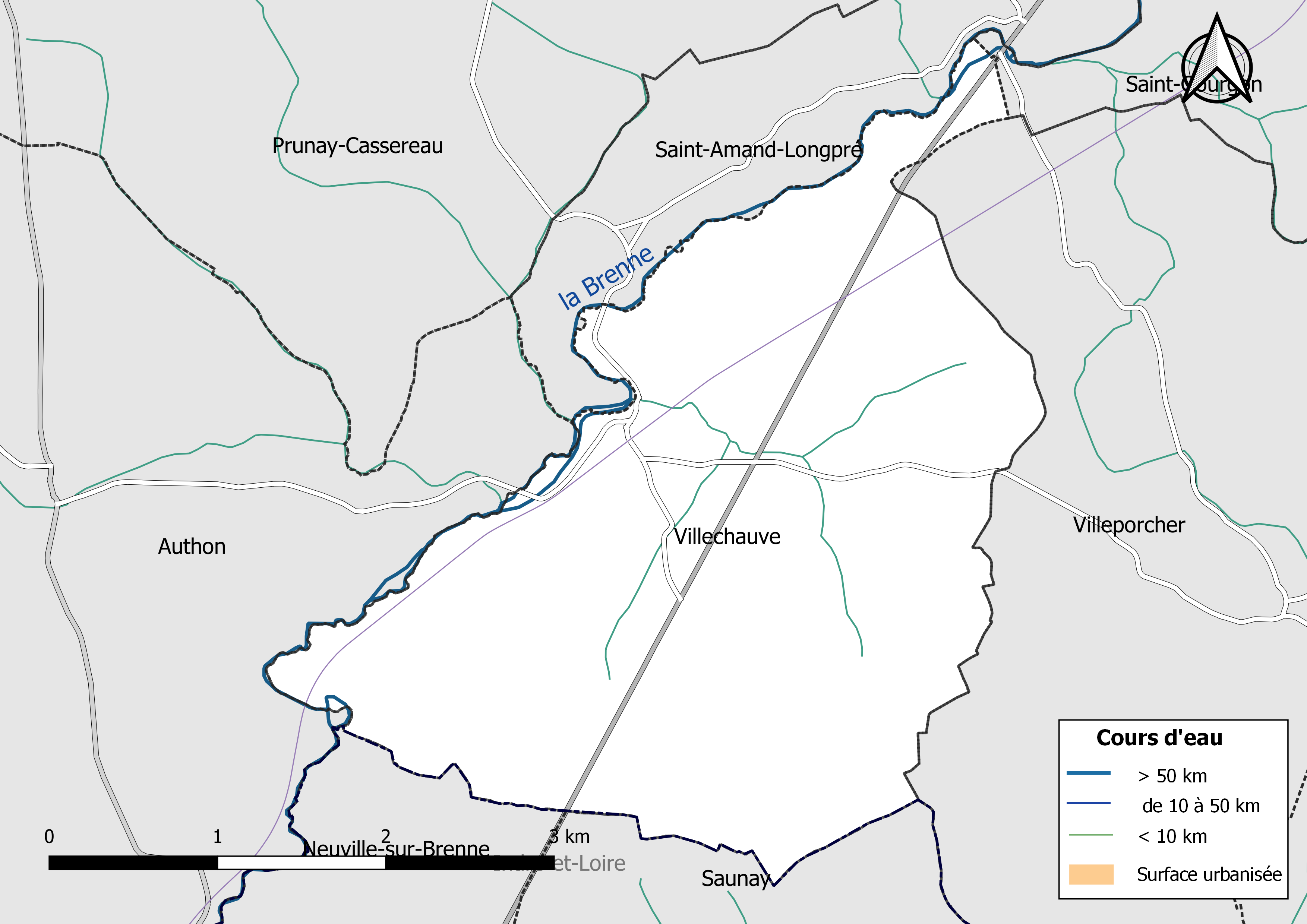 Carte du réseau hydrographique de la commune de Villechauve (Loir-et-Cher, France).